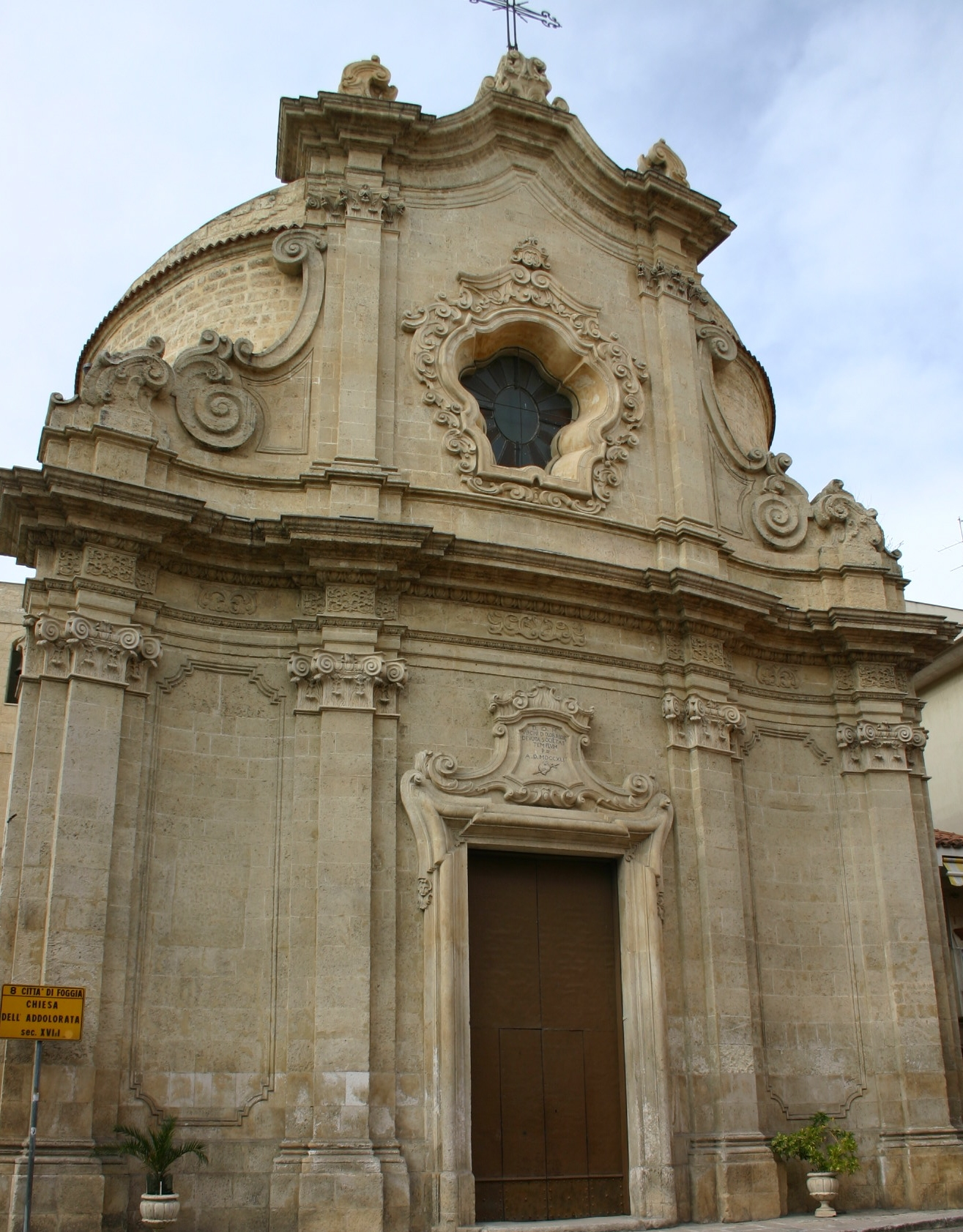 Chiesa Beata Vergine Maria Addolorata - Foggia